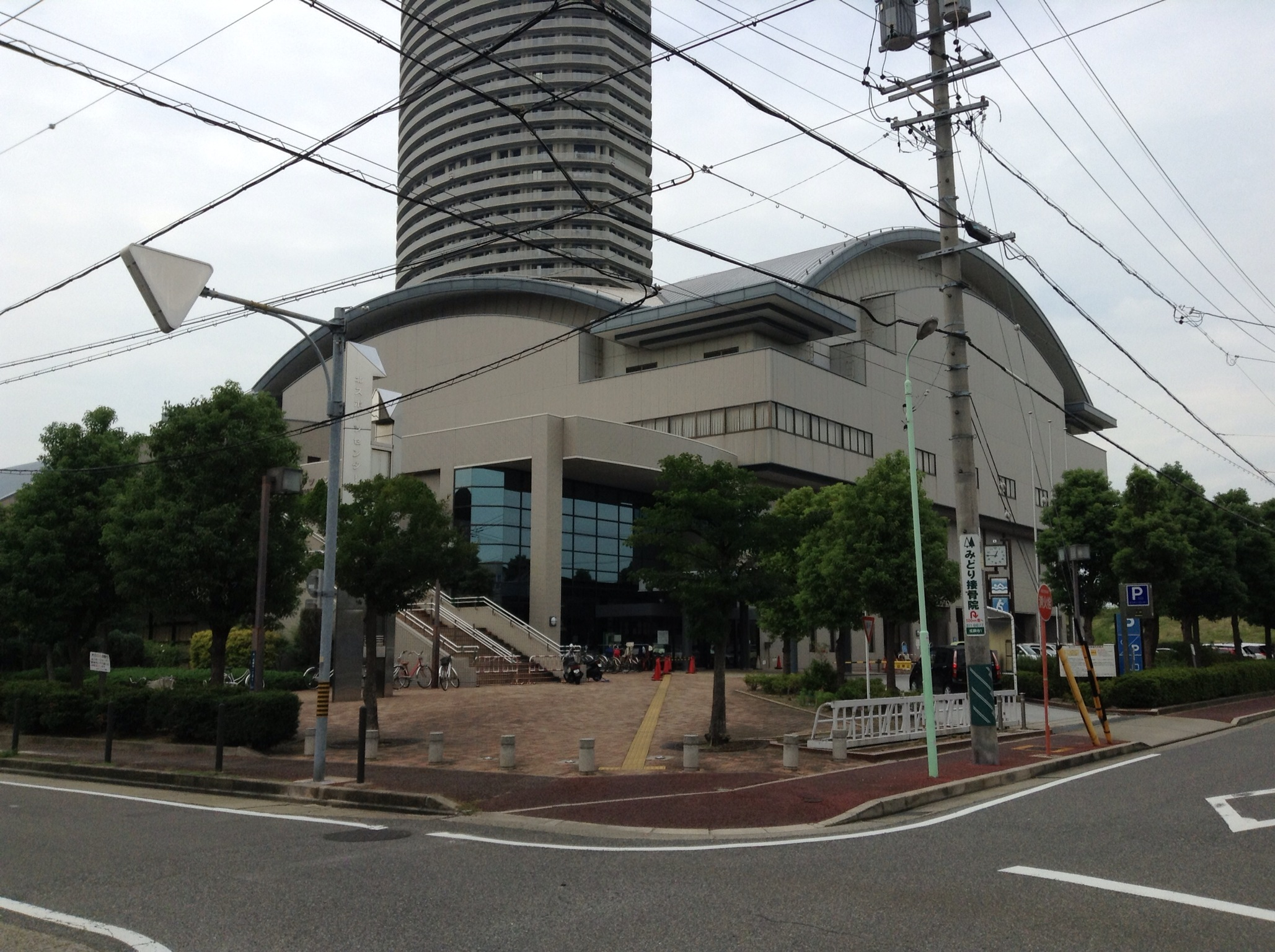 名古屋市北区成願寺の名古屋市北スポーツセンター